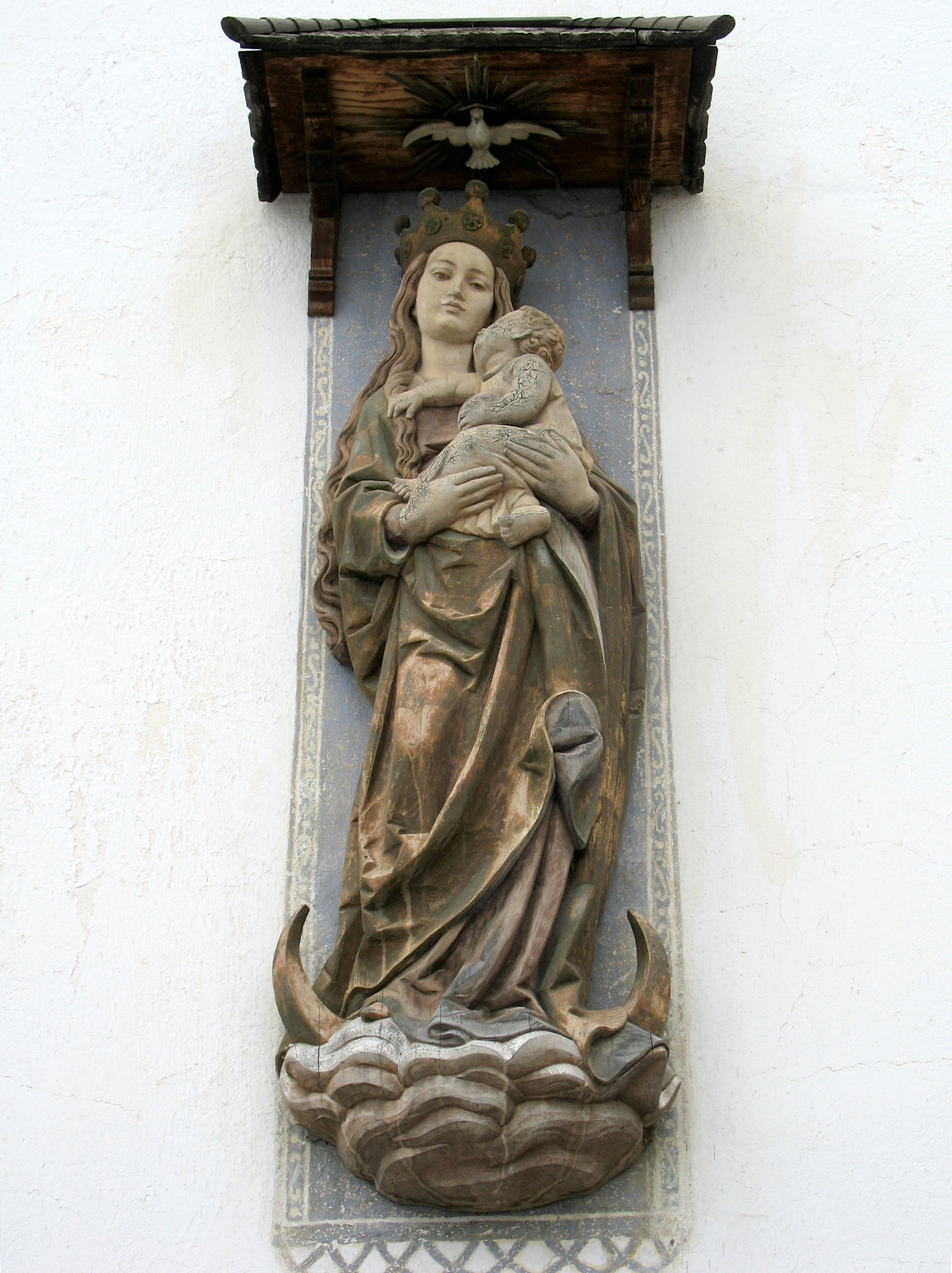 On House Lenert in St. Ulrich in Gröden - Ortisei Val Gardena - Sculptor Ludwig Moroder